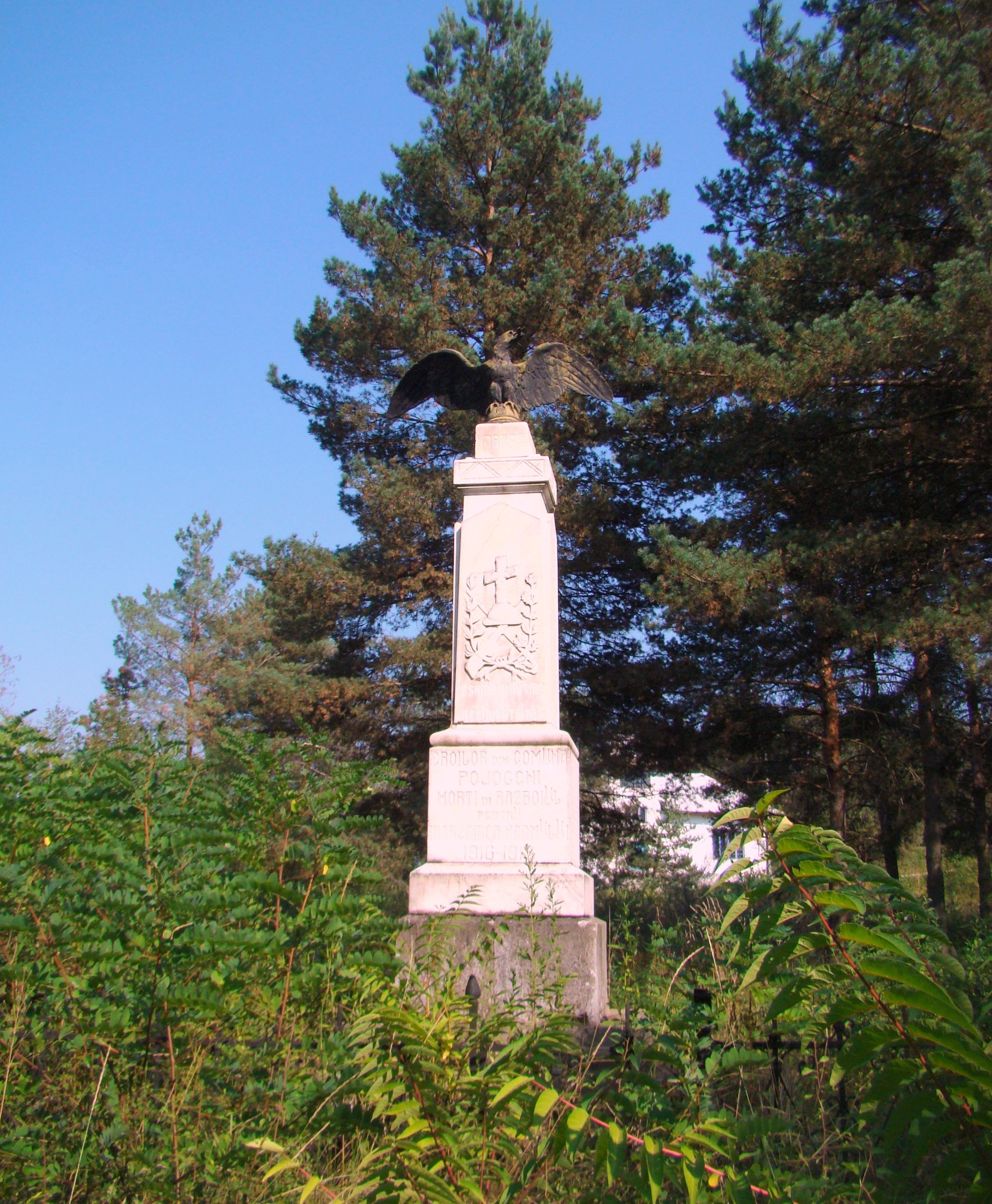 Monumentul eroilor căzuți în primul război mondial, sat Pojogeni, judeţul Gorj